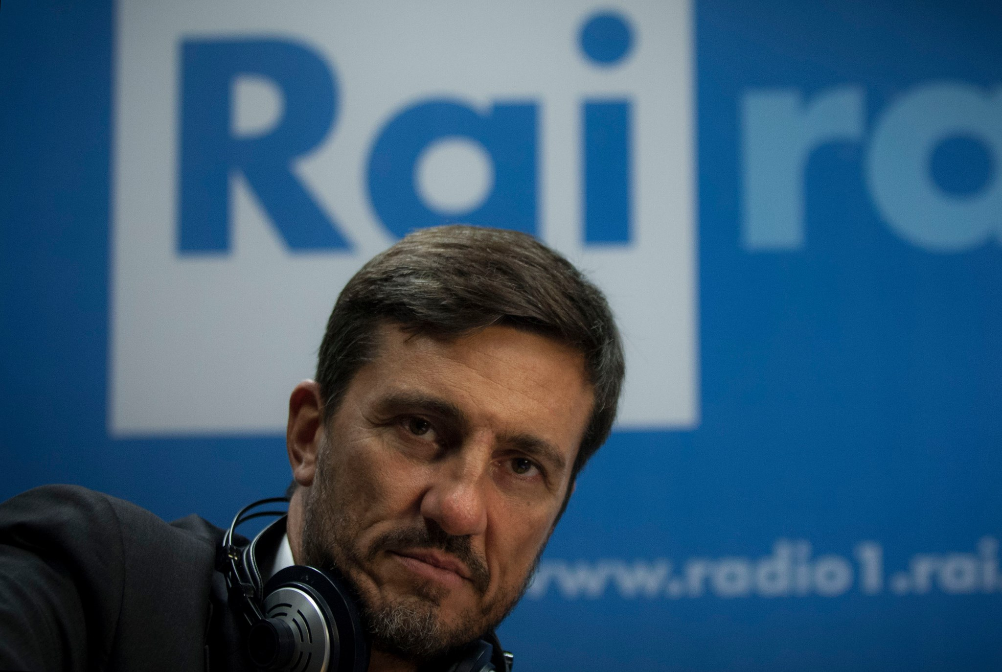 REDIRECTPaolo Corsini Presidente dell'#REDIRECTAssociazione Lettera22